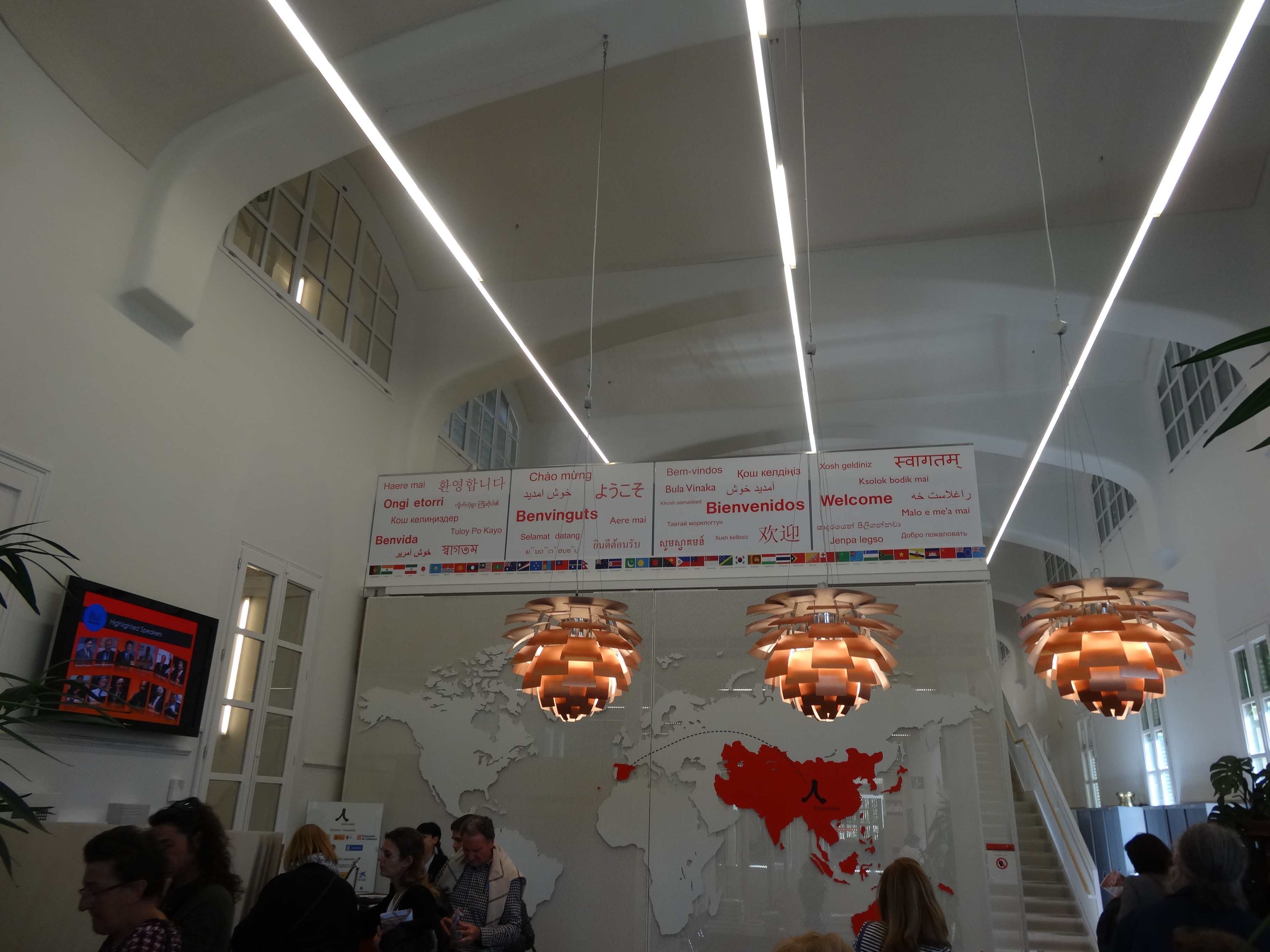 Pavelló de Sant Manuel (Hospital de la Santa Creu i Sant Pau, Barcelona.